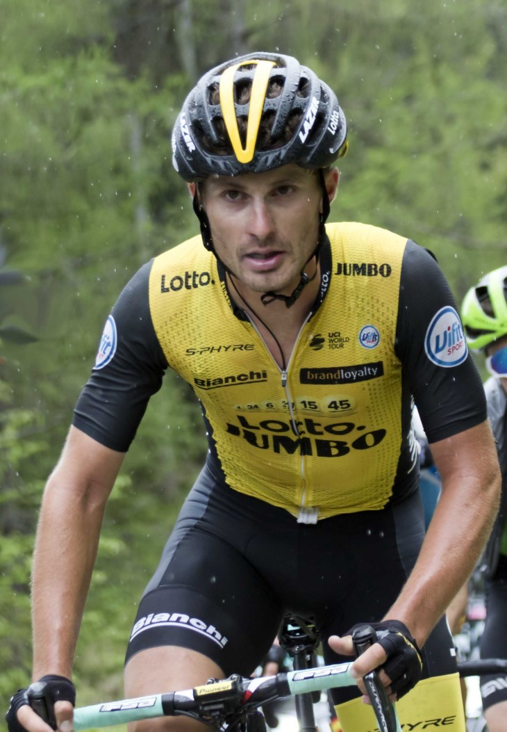 GIR20094 battaglin